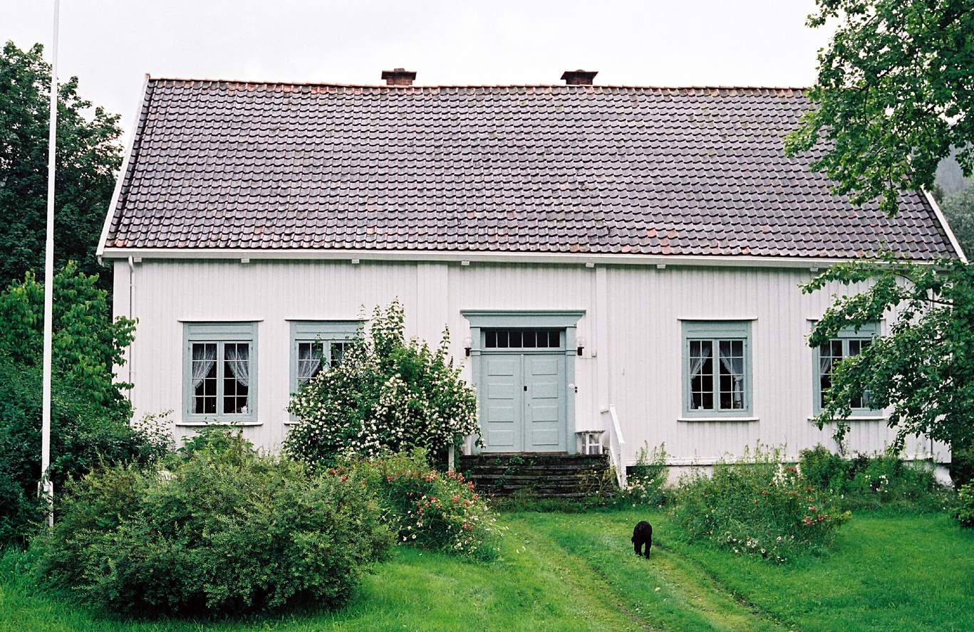 Rollag prestegard.